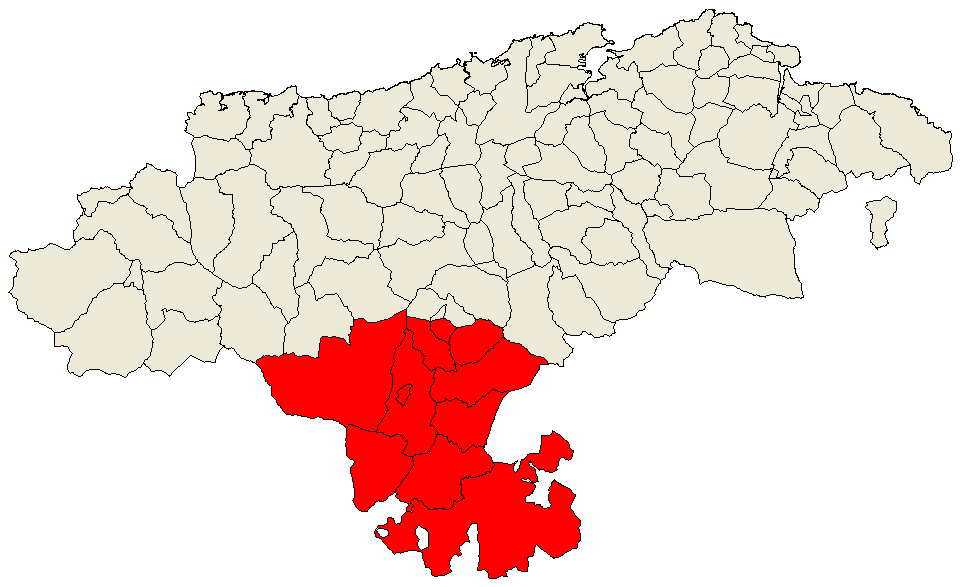 Situación de la comarca de Campoo en Cantabria Situación de la comarca de Campoo, Cantabria (España)